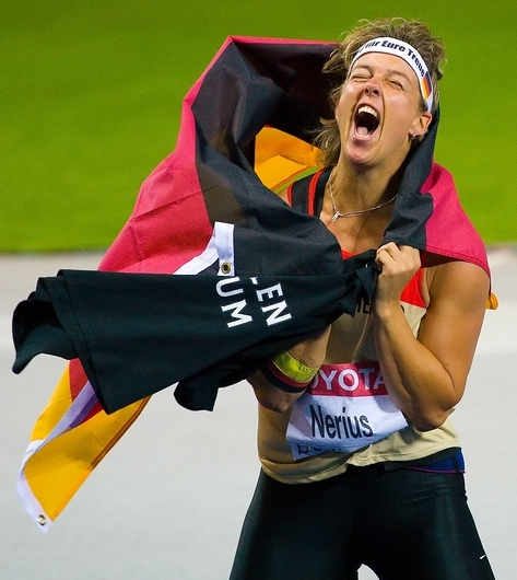 Steffi Nerius - Weltmeisterin im Speerwerfen